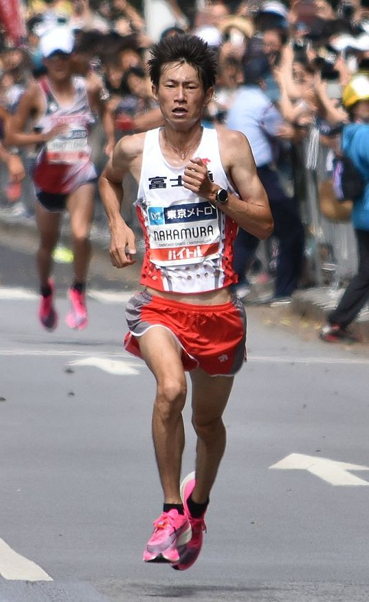 中村 匠吾